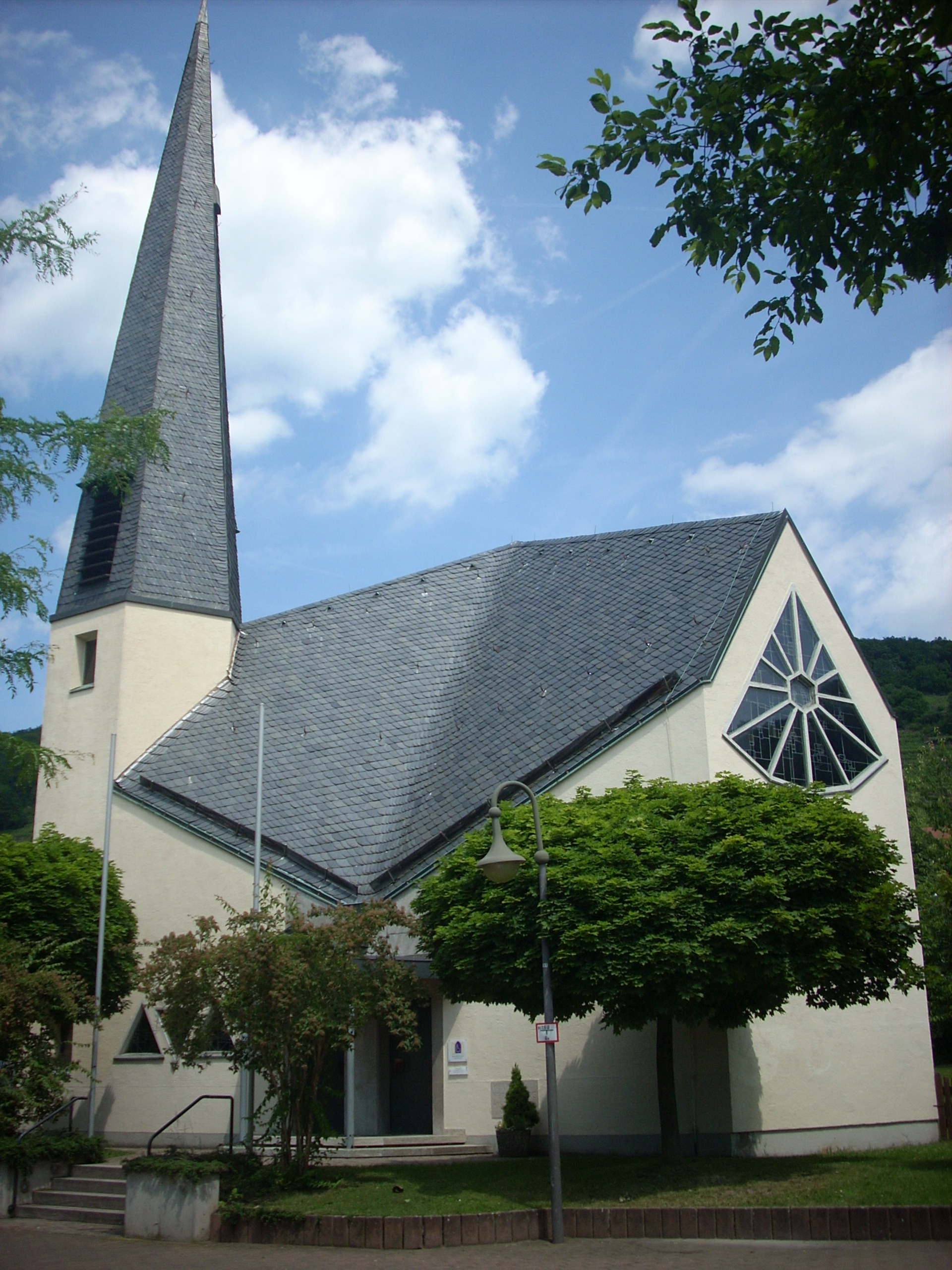 Klingenberg am Main (Evangelische Trinitatis-Kirche, erbaut 1966)